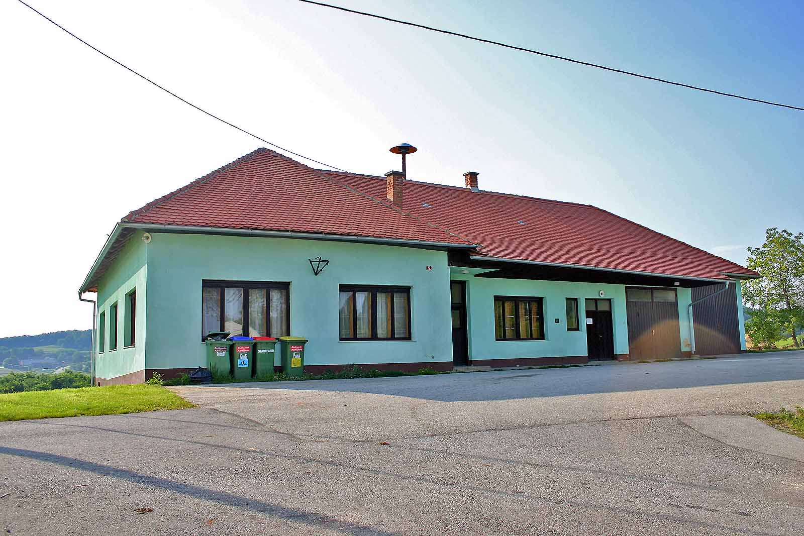 Prostovoljno gasilsko društvo Kuštanovci. Volunteer fire Kuštanovci. Freiwillige Feuerwehr Kuštanovci.